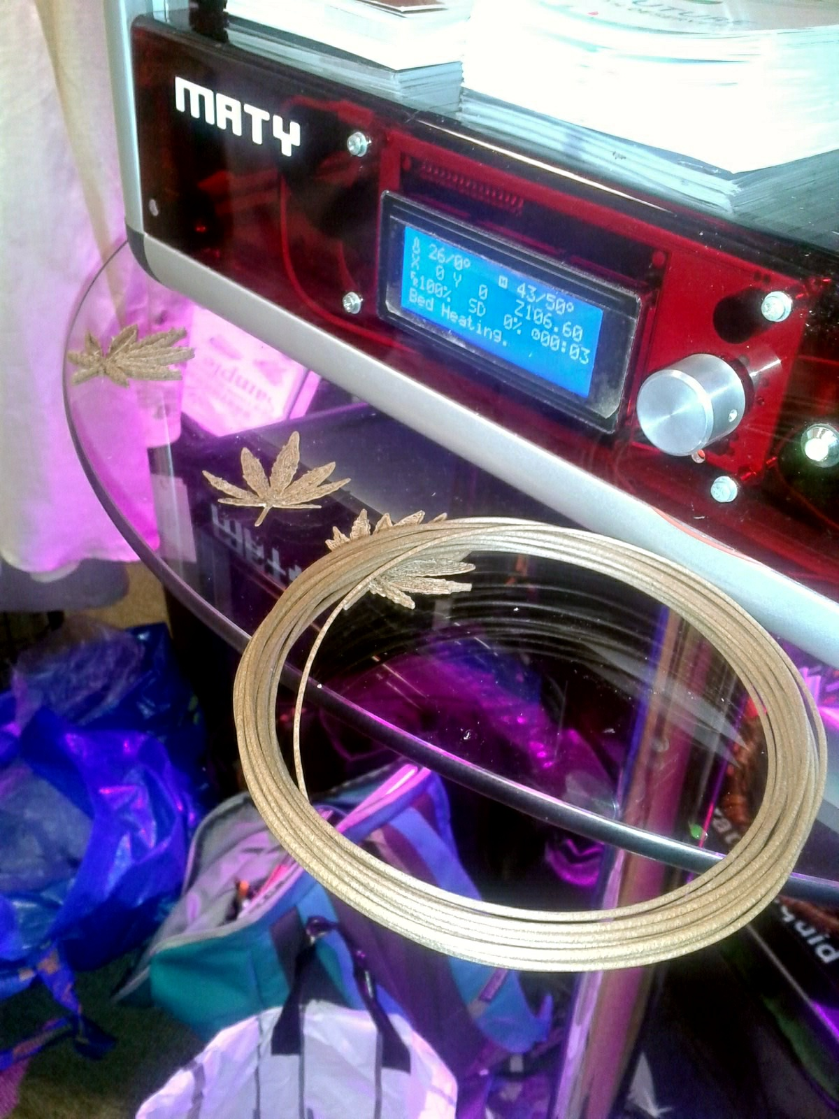 stampante 3d,filamento di canapa per stampante 3d, foglia di canapa stampata con stampante 3d usando filamento di canapa